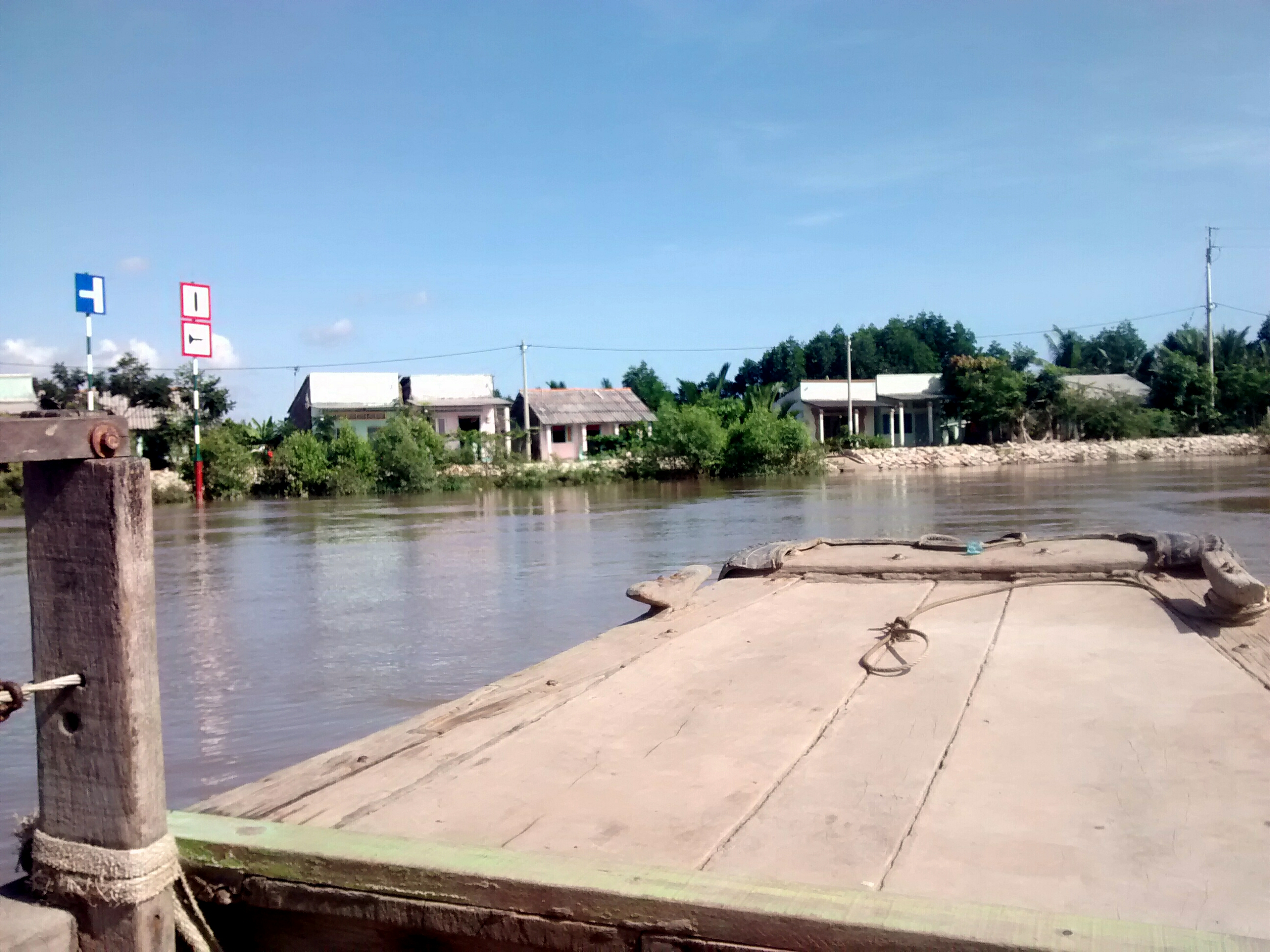 Đò qua Tắc Ráng, An Thới Đông